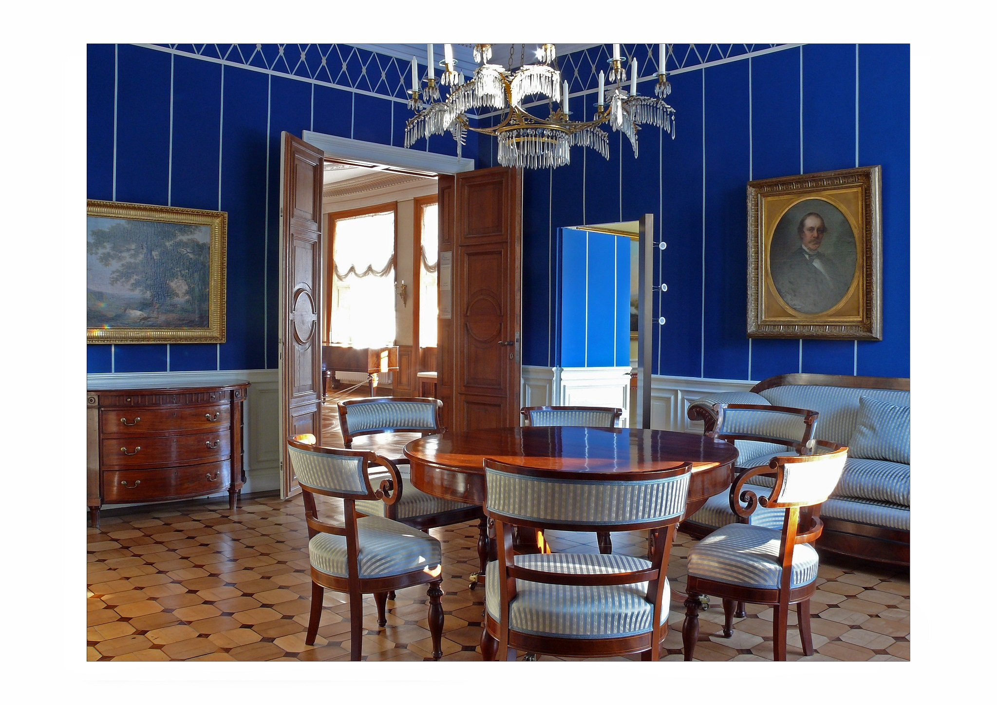 Blaues Wohnzimmer im Schloss Ahrensburg, neue Aufnahme